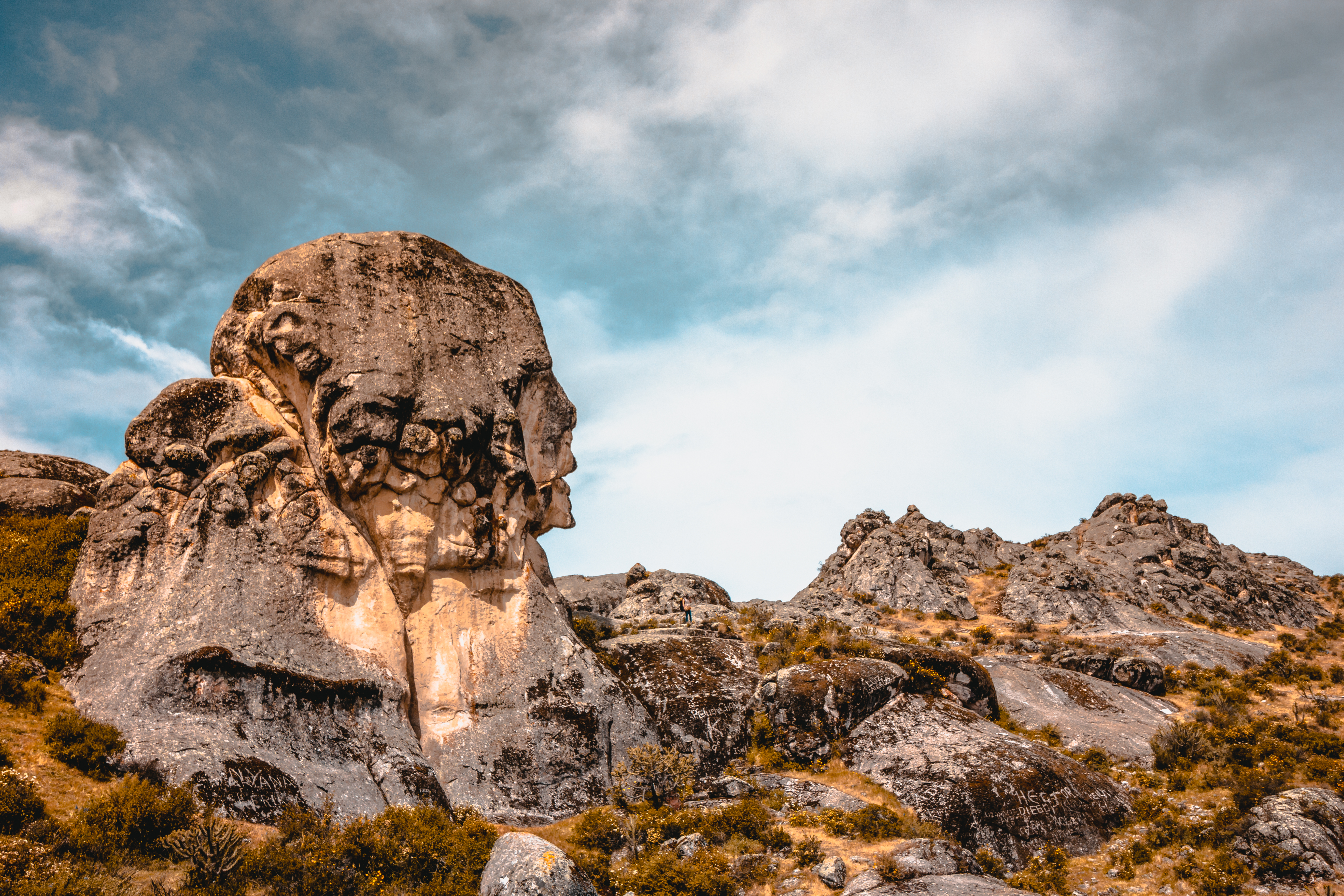 Meseta de Marcahuasi, San Pedro de Casta, Lima